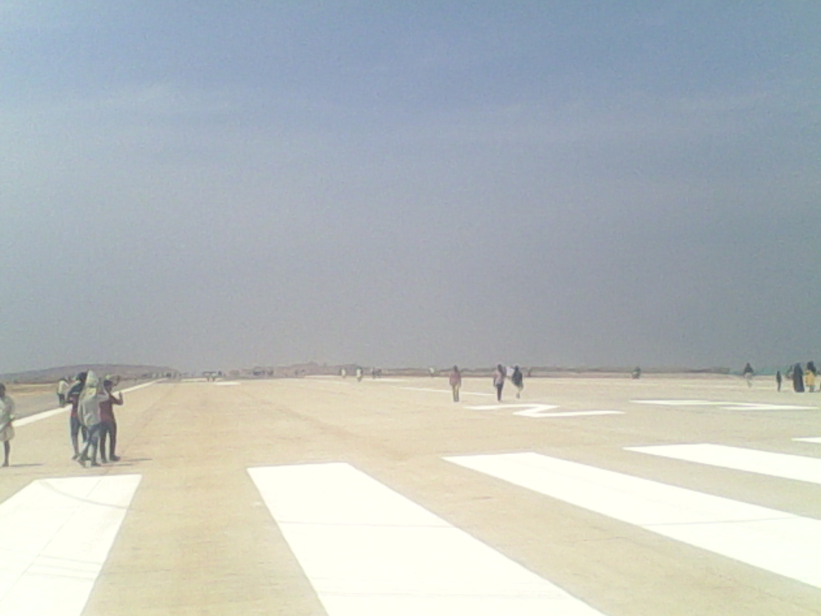 കണ്ണൂർ അന്താരാഷ്ട്ര വിമാനത്താവളത്തിലെ പണി പുരോഗമിച്ചു കൊണ്ടിരിക്കുന്ന റൺവേ